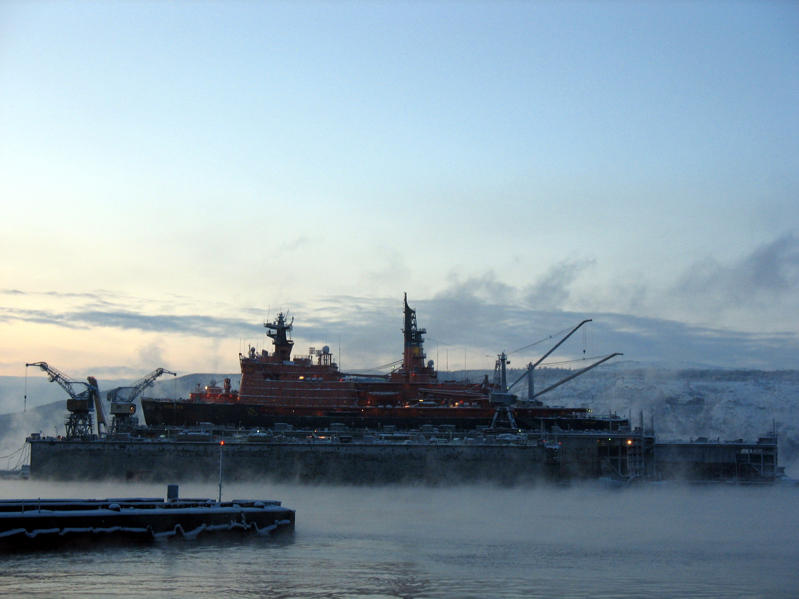 Ледокол Россия в плавучем доке.